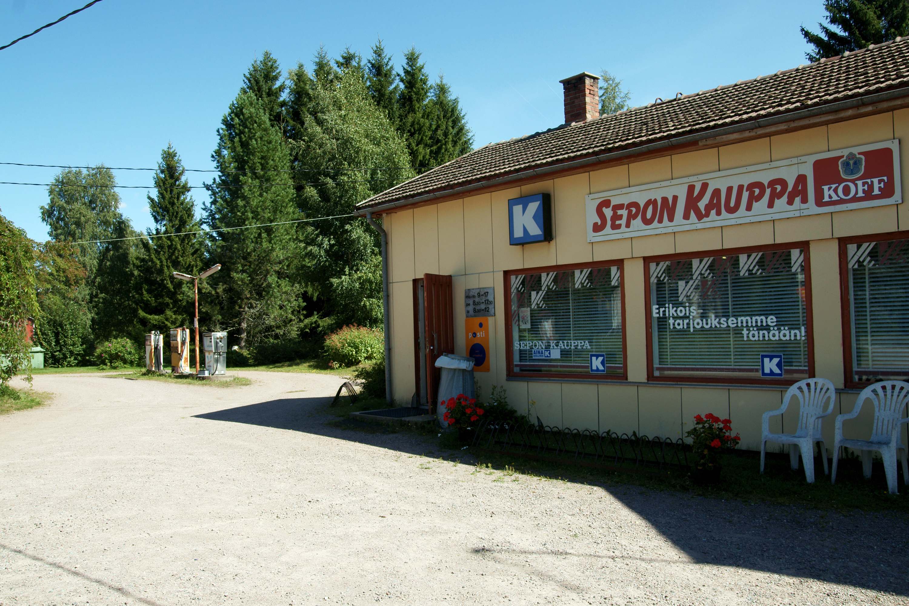 Köyliön Yttilän kyläkauppa Sepon kauppa.